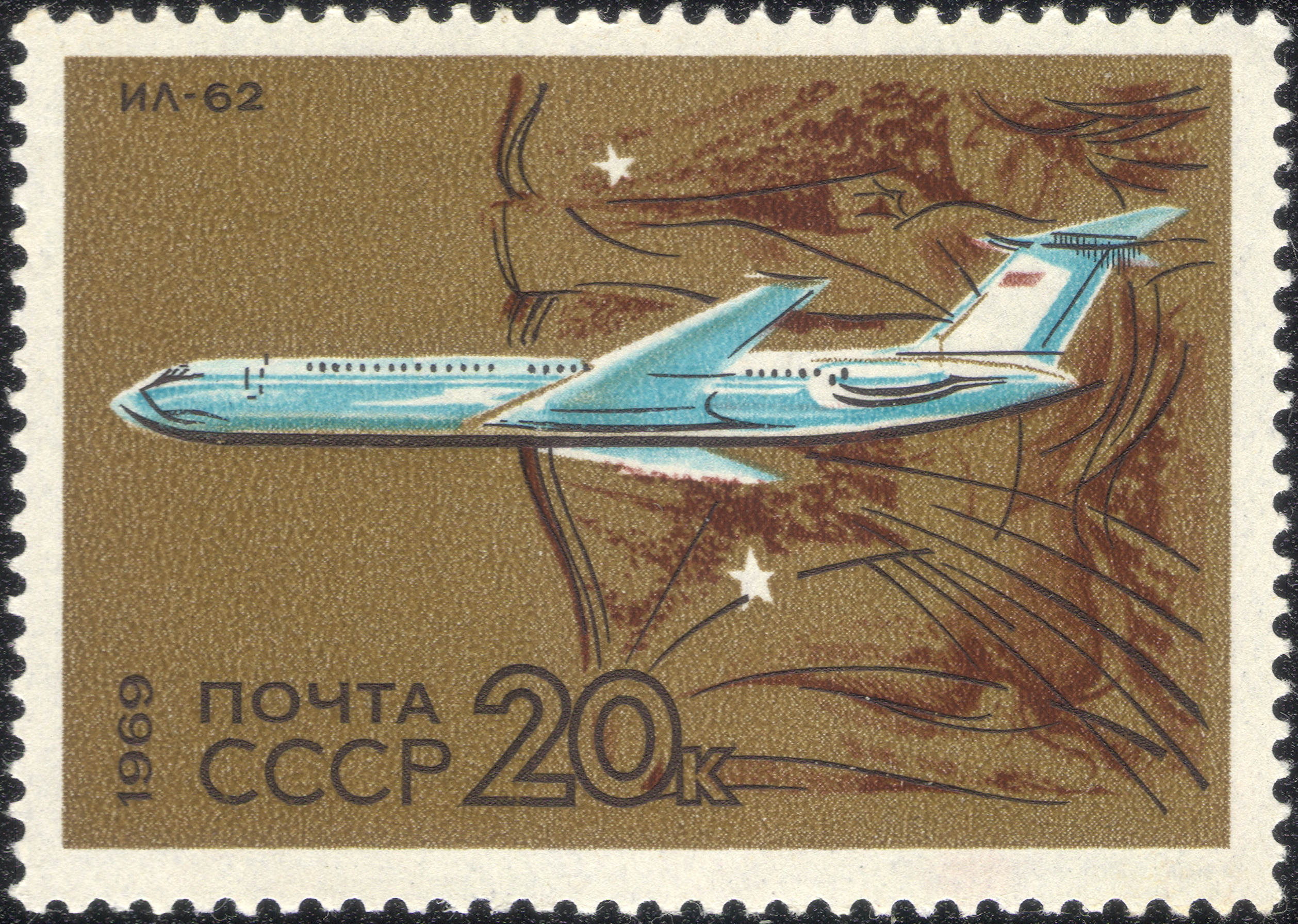 Марка СССРː Турбореактивный трансконтинентальный самолет Ил-62, 1962. Астрономический знак созвездия Стрельца. Серияː Развитие гражданской авиации в СССР